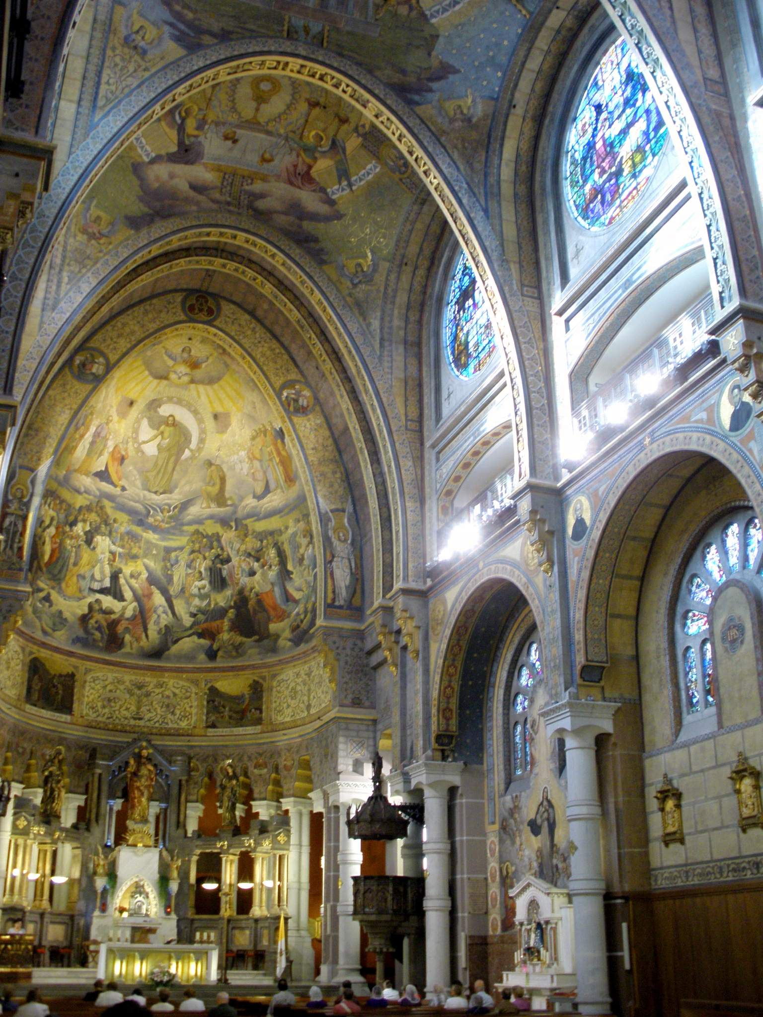 lica del Sagrado Corazón de Jesús (Gijón, Asturias)